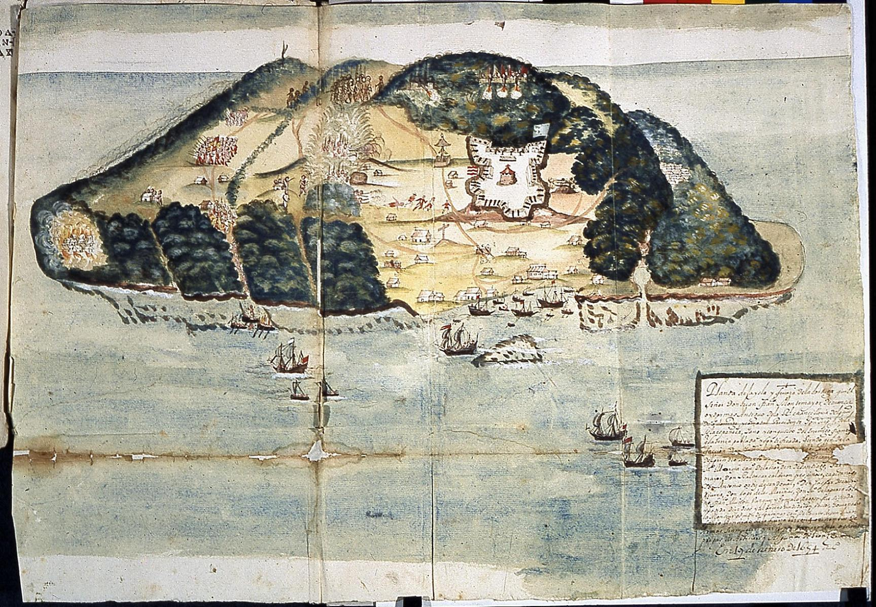 mapa siglo XVII del instituo hidrográfico de la marina